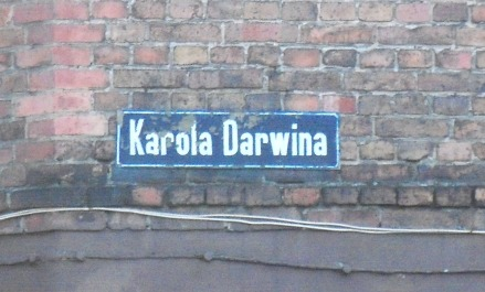 znak - ulica Darwina w Katowicach